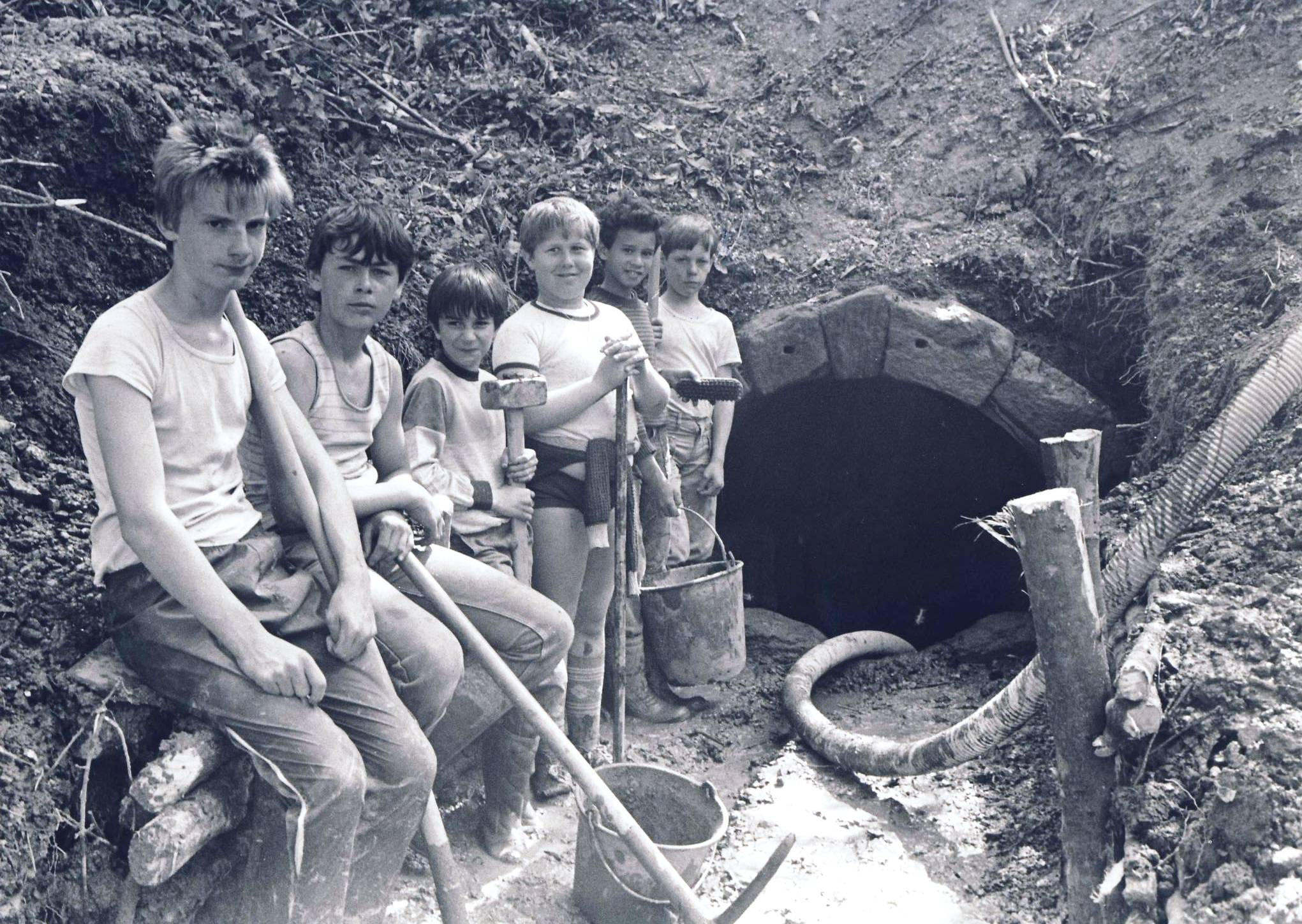 Lièpvre 01.JPG